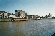 imm015 Bateaux Lavoirs Laval France 050105 small Melusin propriétaire des négatifs et de la haute définition.